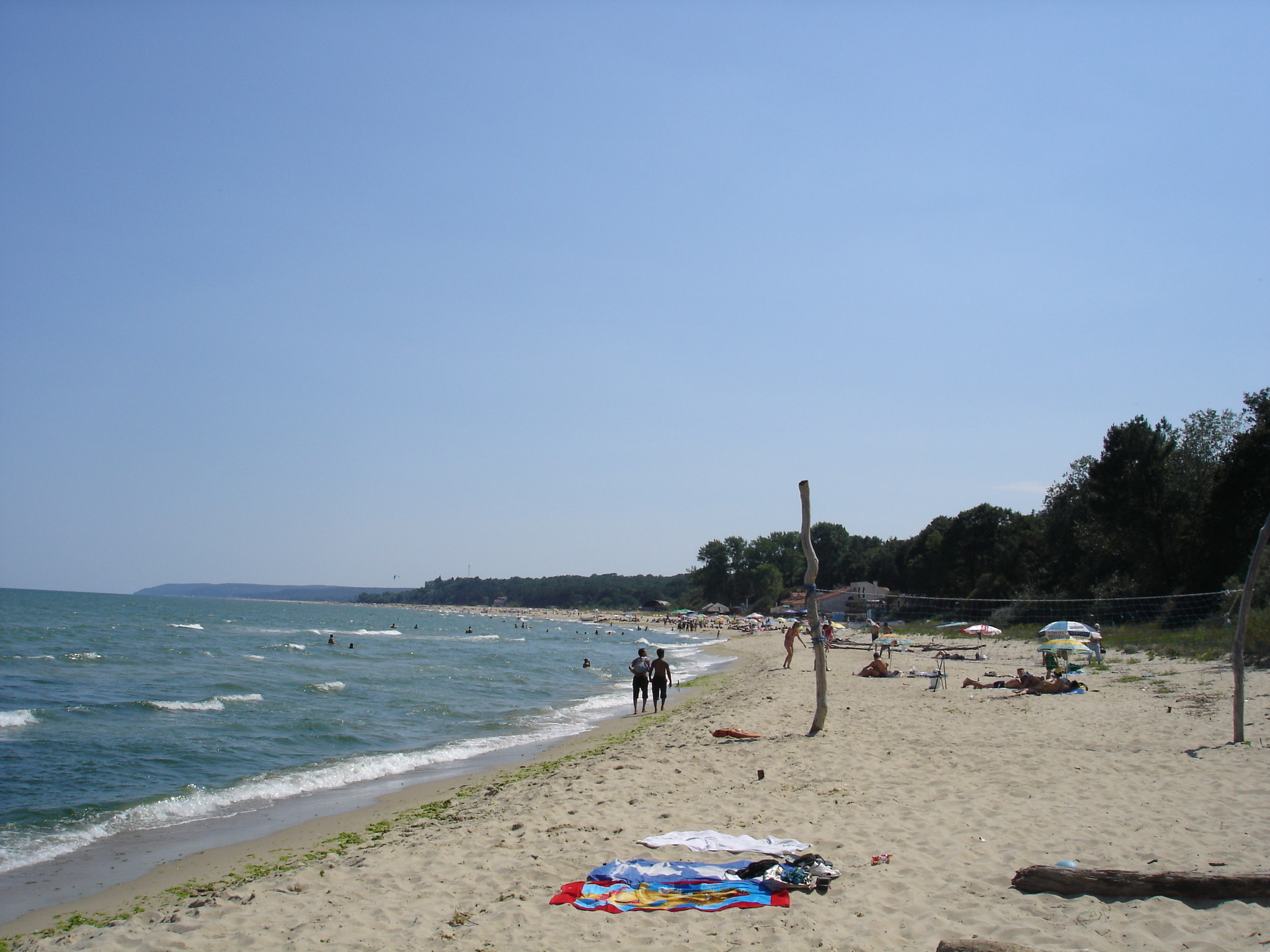 Camping Romantika near Kamchia river, Bulgaria